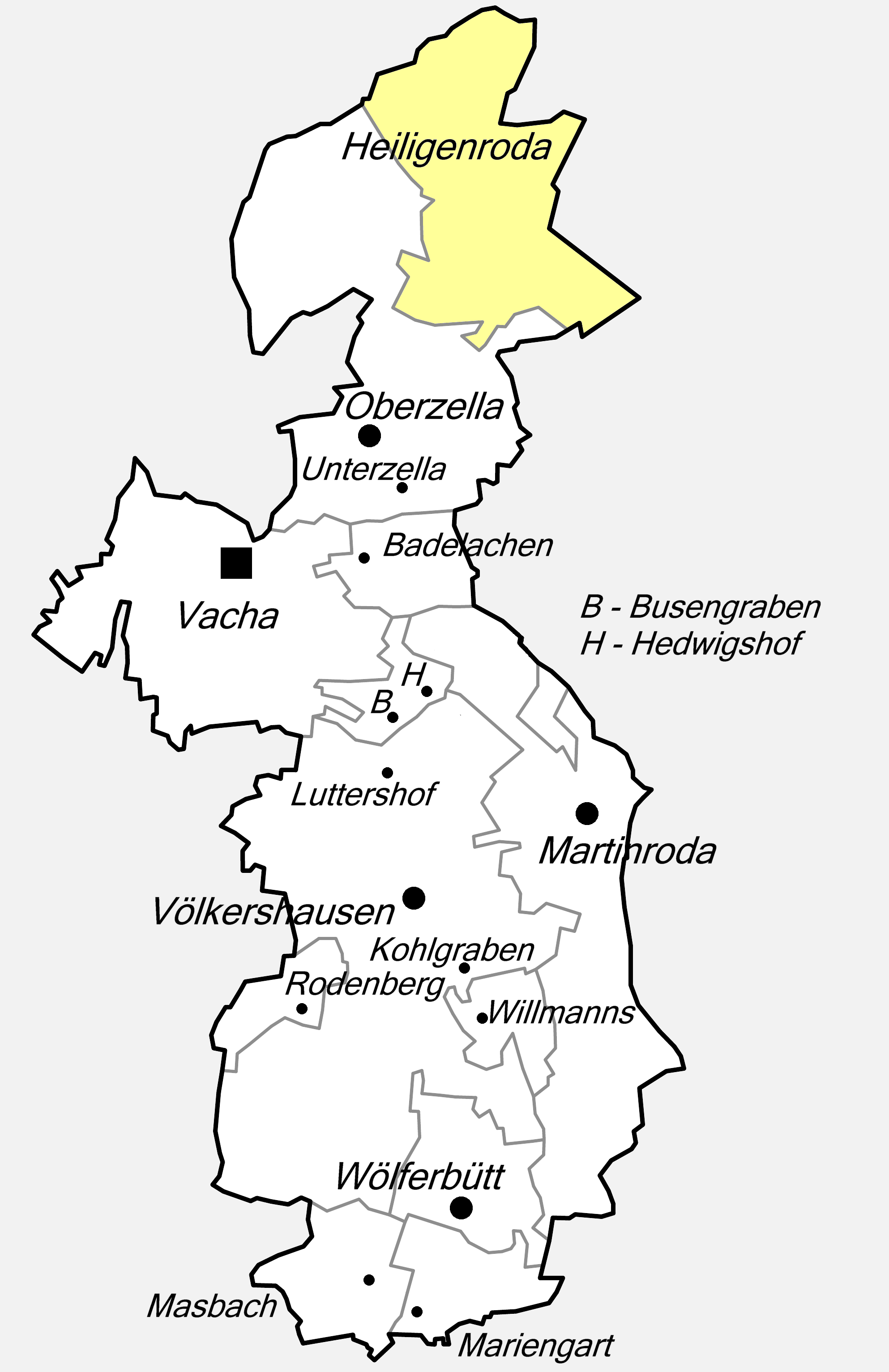 Lage des ehemaligen Ortes Heiligenroda im Stadtgebiet von Vacha.